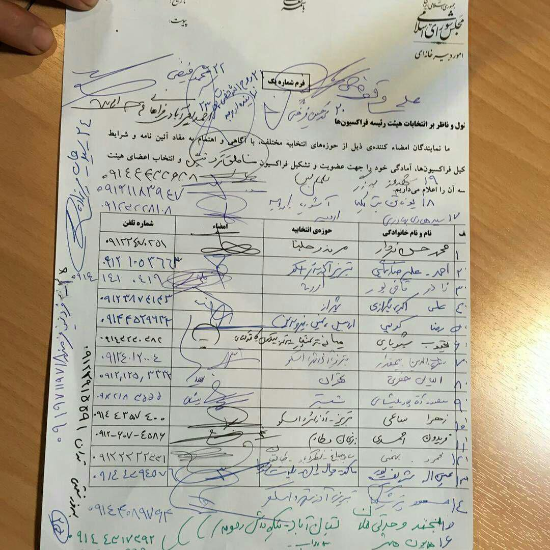 فرم پیوستن به فراکسیون مناطق ترک زبان مجلس